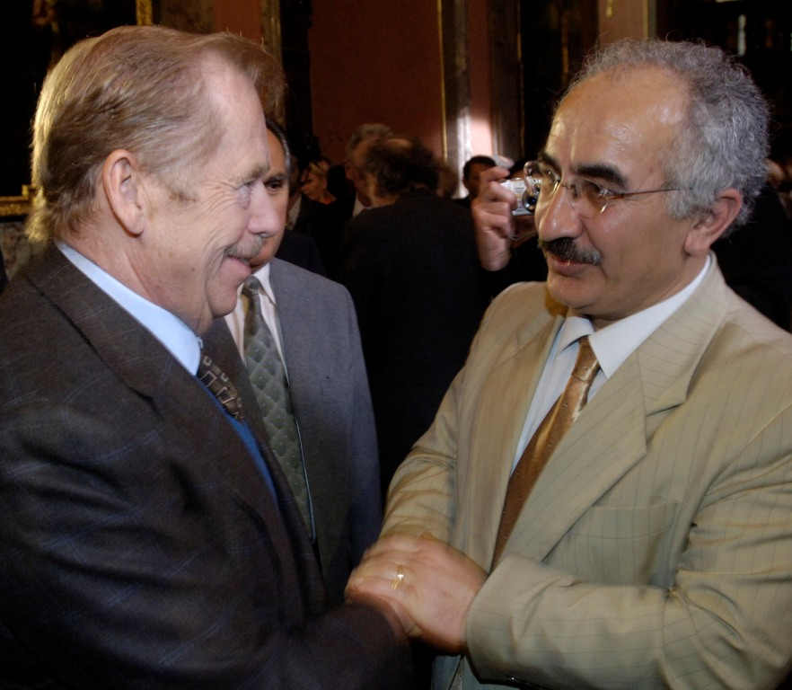 yekta uzunoglu Vaclav Havel ile